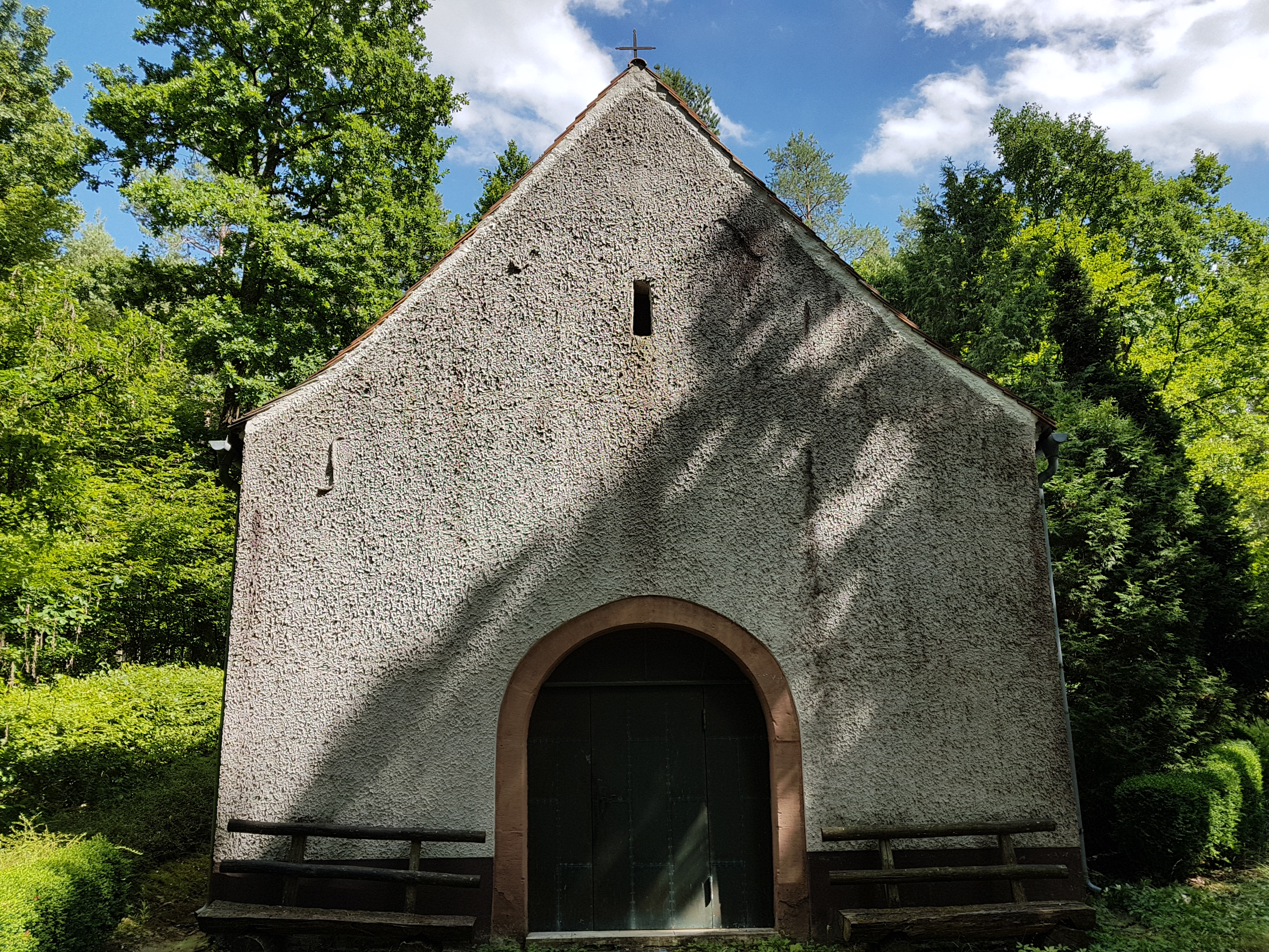 Die 12. Kapelle des Dittwarer Kreuzweges wurde „Kalvarienberg“ genannt, da sie größer als die Übrigen war und sich in der „Kalvarienbergkapelle“ ein Altar zur Erinnerung an die Kreuzigung befand. Von der ersten Station bis zum Kalvarienberg zählte man 1361 Schritte; Das soll laut Legende der Abstand des historischen Kreuzweges in Jerusalem sein. Im ersten Dittwarer Wallfahrtsbüchlein wurden auch eine ganze Reihe von weiteren Wundern aufgezählt, die sich im Jahre 1670 ereignet haben sollen. Ursprünglich handelte es sich beim Dittwarer Kalvarienbergkapelle um eine Behausung der Einsiedler. Diese wurde aber von einem Freiherrn Bettendorff zu Gissigheim zu einem weiteren Kapellchen (neben der eigentlichen Kreuzkapelle) umgebaut.